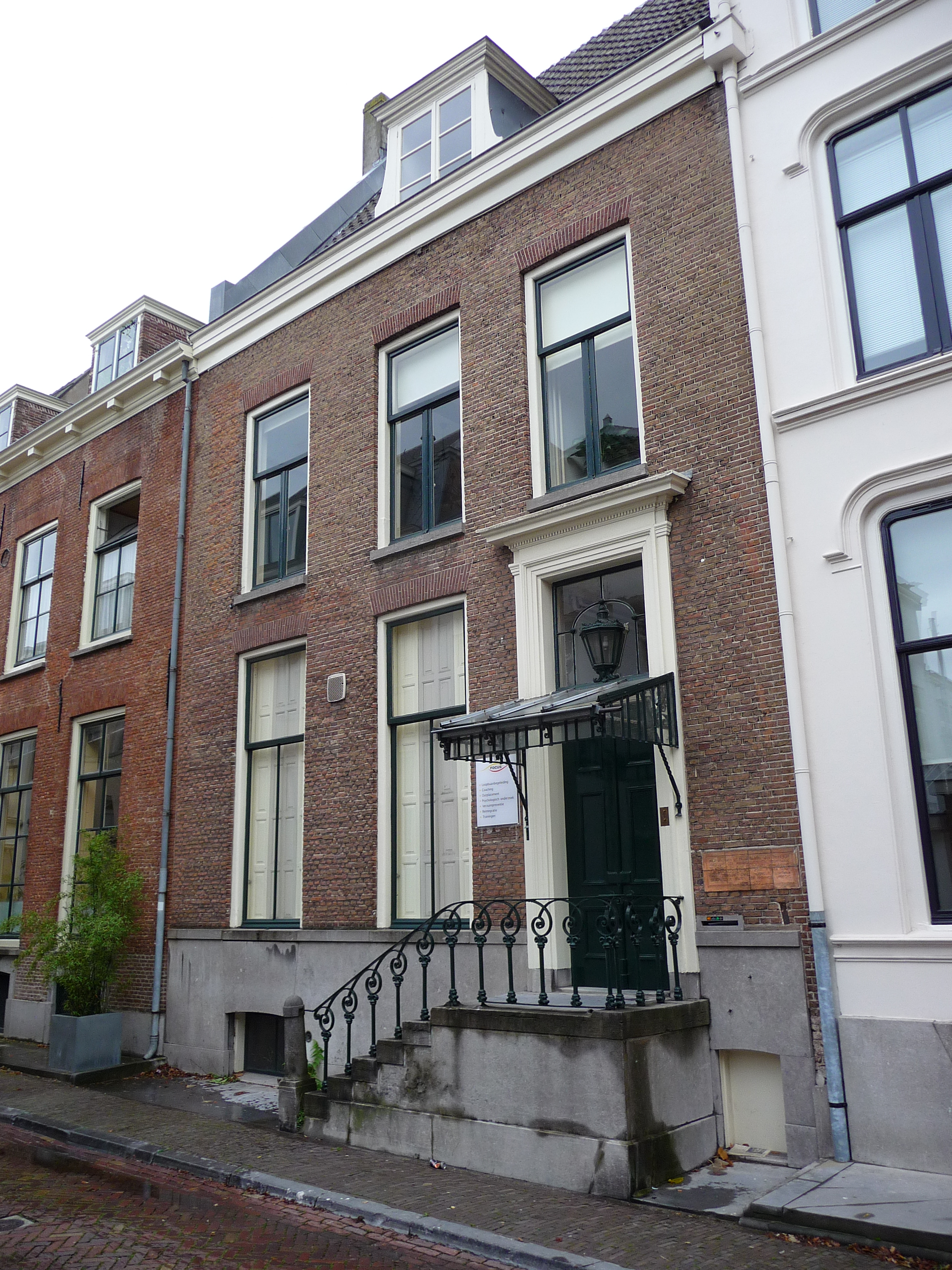 Rijksmonument in Utrecht.